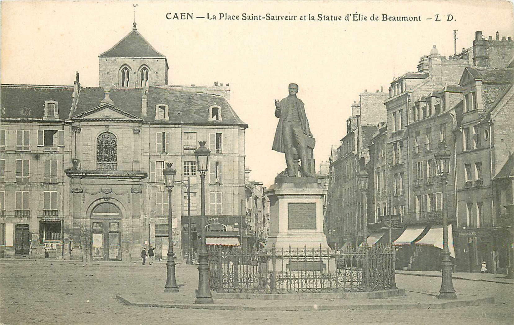 Caen, département du Calvados, sur une carte postale de la fin du 19e ou du début du 20e siècle. La place Saint-Sauveur, vue du Sud-Ouest vers le Nord-Est. En arrière plan à gauche, l'église du Vieux Saint-Sauveur. Au centre, la statue en bronze d'Élie de Beaumont réalisée par Louis Rochet. Elle est inaugurée le 6 août 1876. En février 1942, sous le régime de Vichy, elle est déboulonnée et fondue dans le cadre de la mobilisation des métaux non ferreux. Après la Libération, une statue en pierre de François de Malherbe est installée sur le piédestal. Le 12 novembre 1961, cette dernière est retirée afin d'installer la statue de Louis XIV réalisée par Louis Petitot en 1828